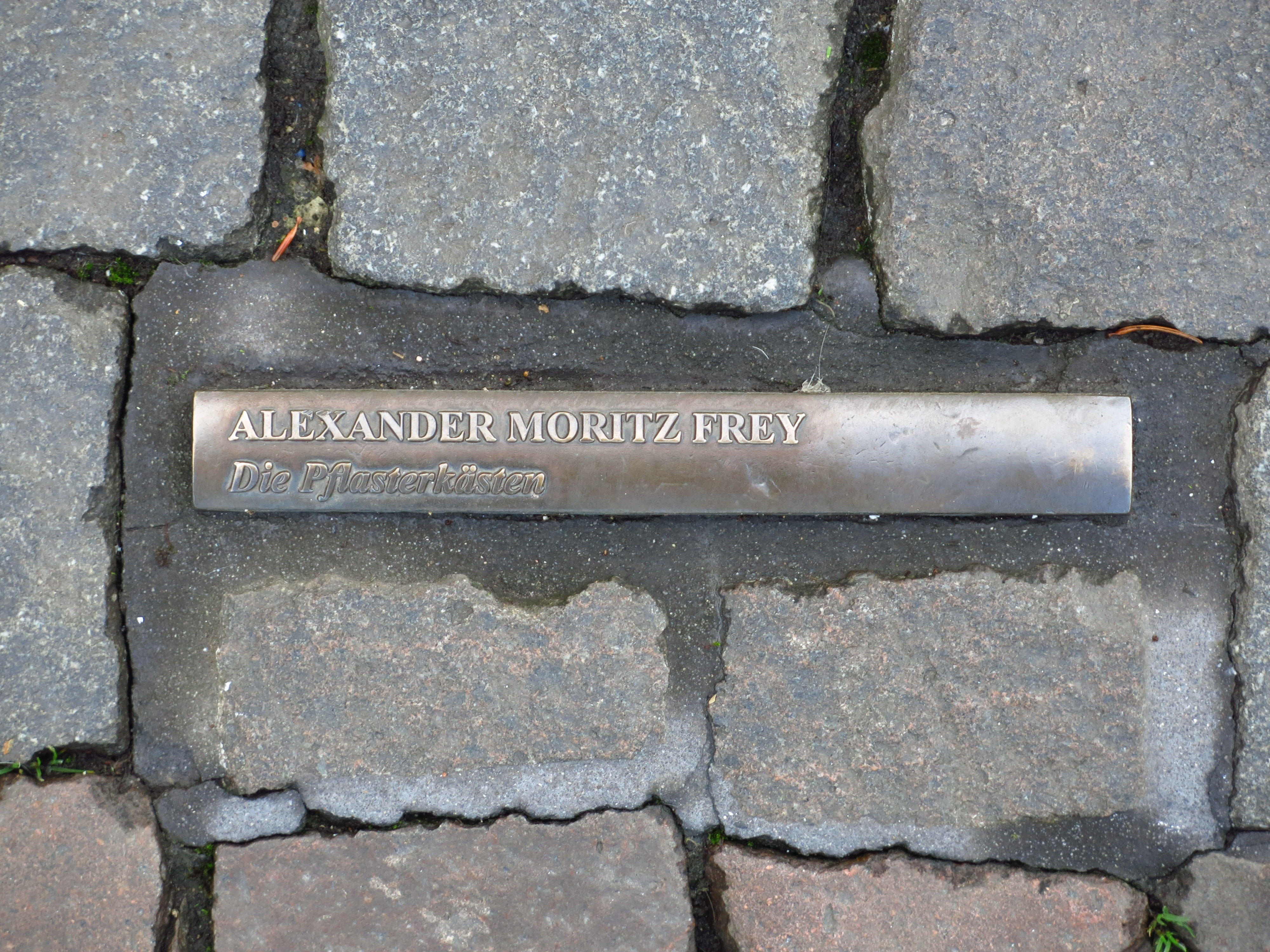 Das Mahnmal zur Bücherverbrennung auf dem Bonner Markt; In das Pflaster des Bonner Markt sind insgesamt 60 sichtbare Buchrücken, sogenannte „Lesezeichen“, verteilt, die sich an der Rathaustreppe, dem Ort an dem die Bücher am 10. Mai 1933 verbrannt wurden, verdichten. Zusätzlich wurde ein wetterfester Archiv-Behälter in Form einer Büchertruhe in den Platz eingelassen. Seine Inschrift benennt das Ereignis und weitere Autoren von verbrannten Büchern.